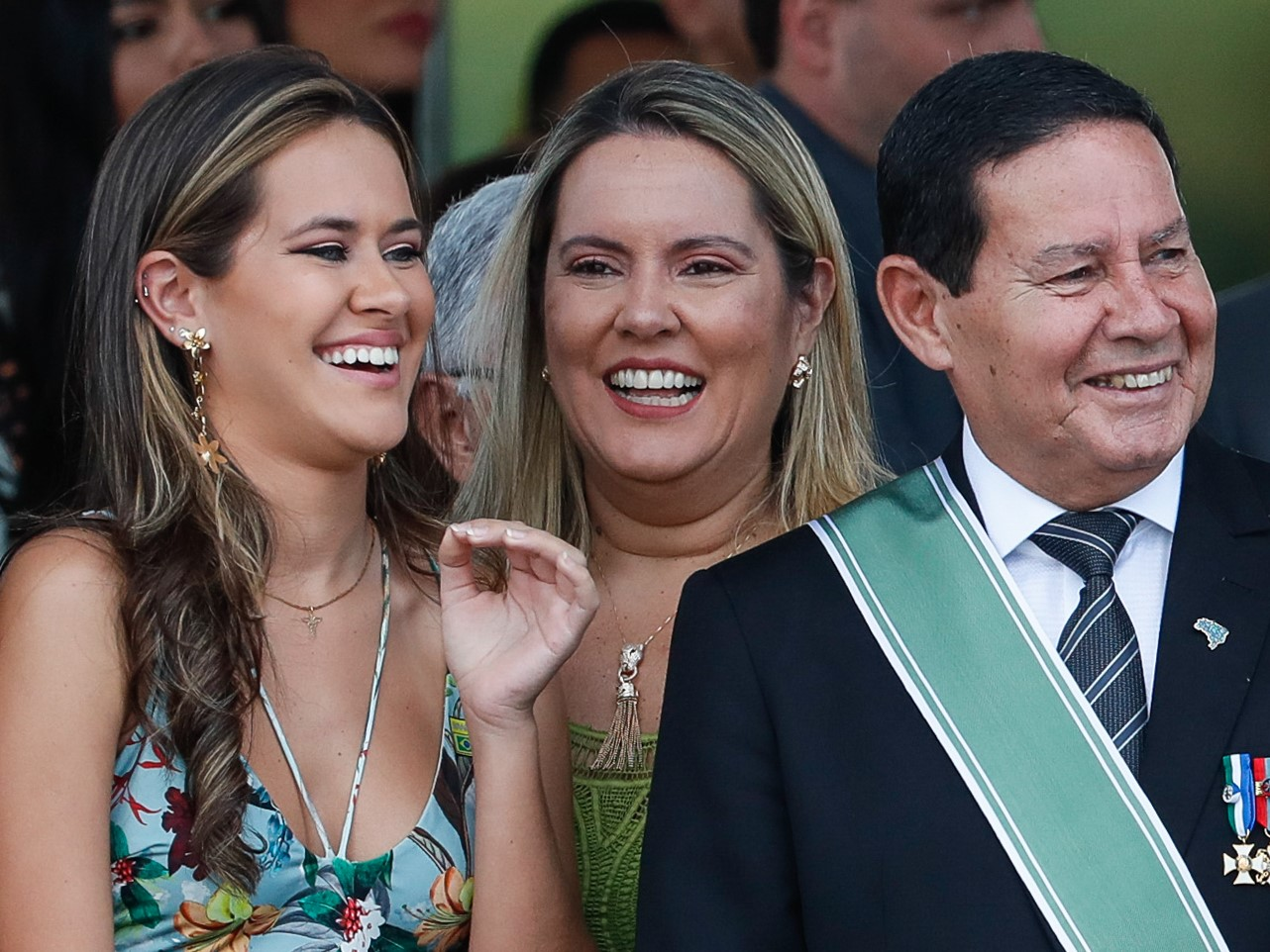 (Brasília - DF, 07/09/2019) Presidente da República, Jair Bolsonaro, durante desfile Cívico por ocasião do Dia da Pátria Foto: Alan Santos/PR